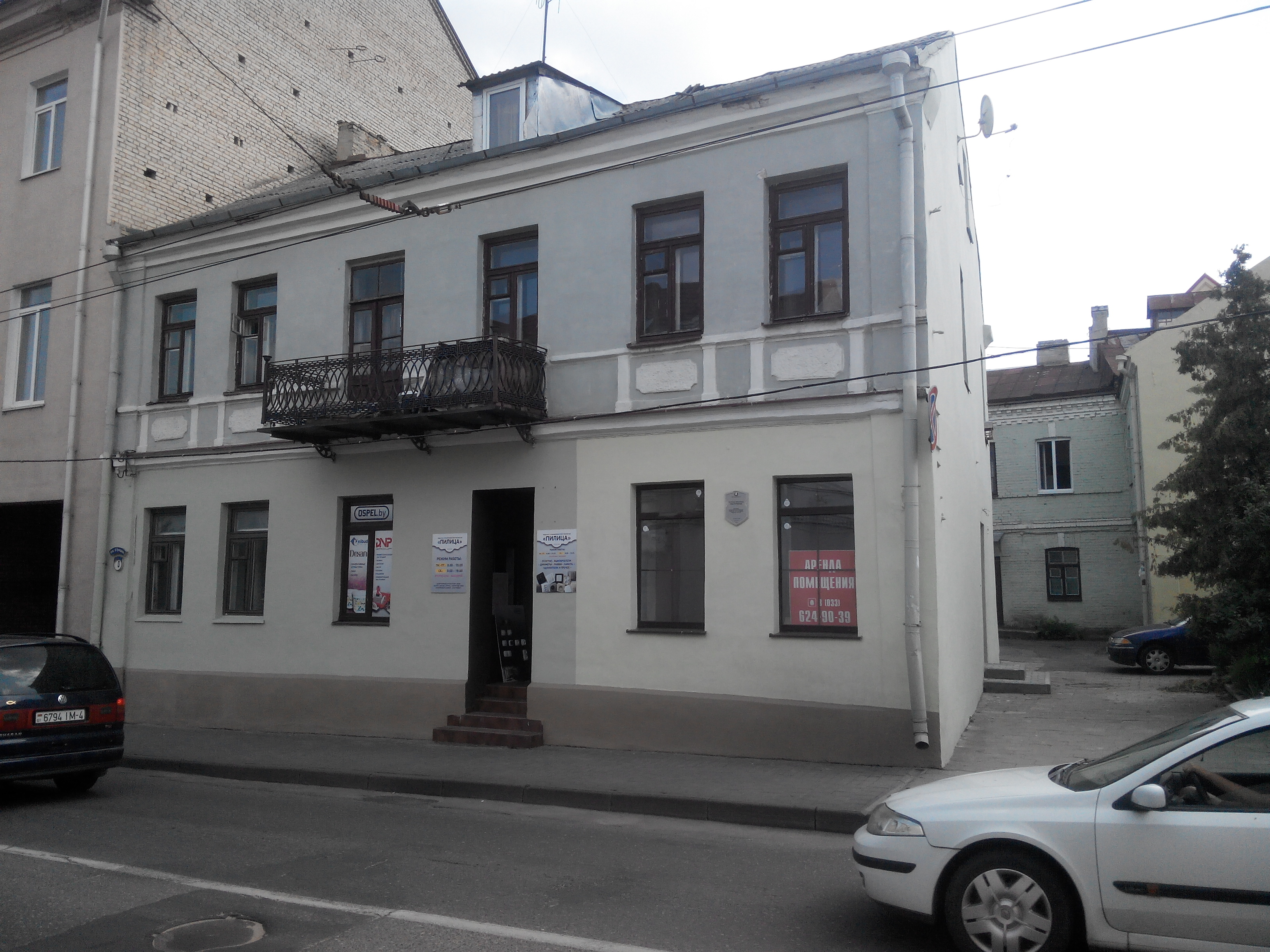 Будынак па вуліцы Вялікая Траецкая, 8, Гродна, Беларусь